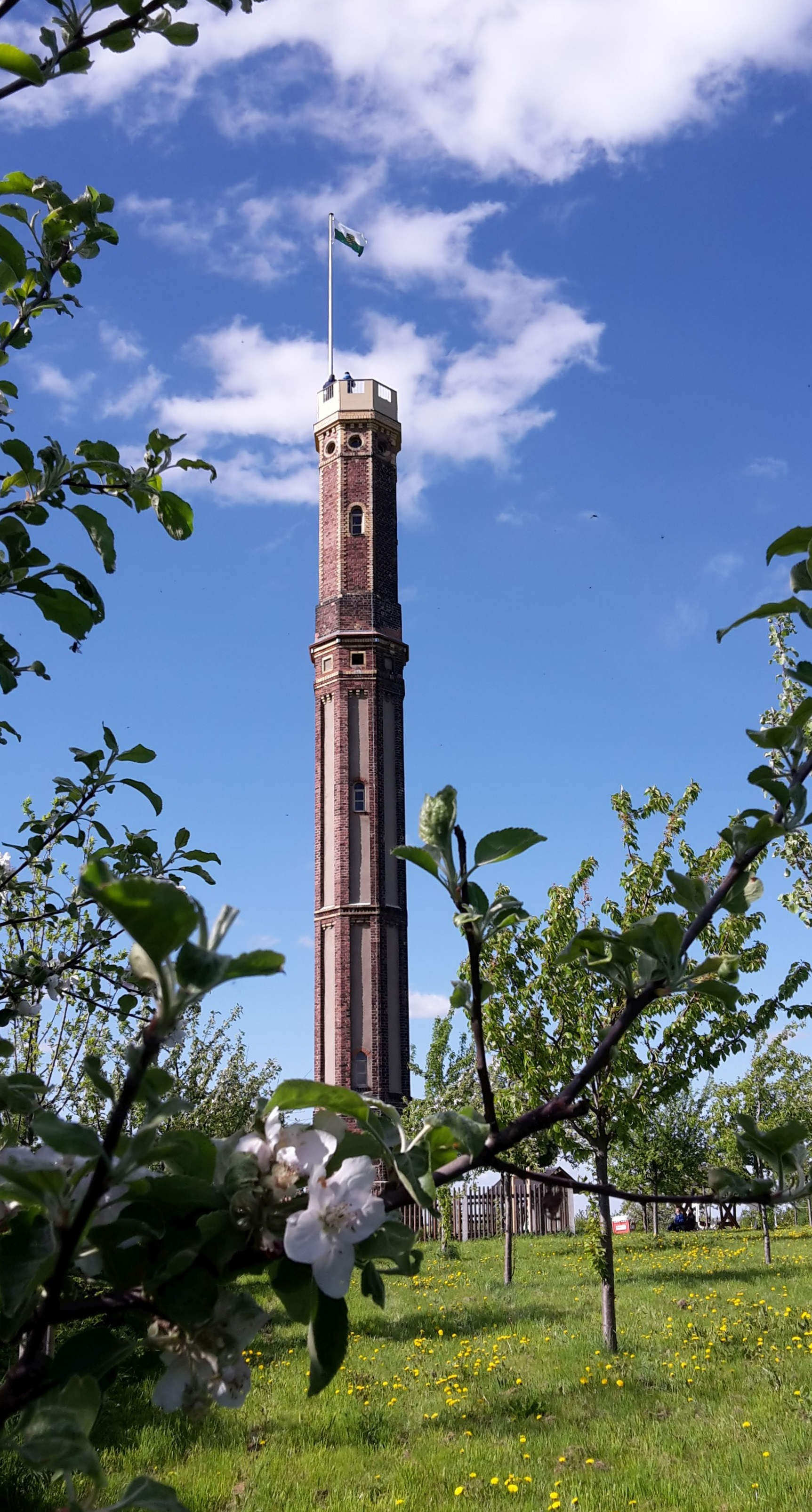 Aussichtsturm Böhrigen in Striegistal